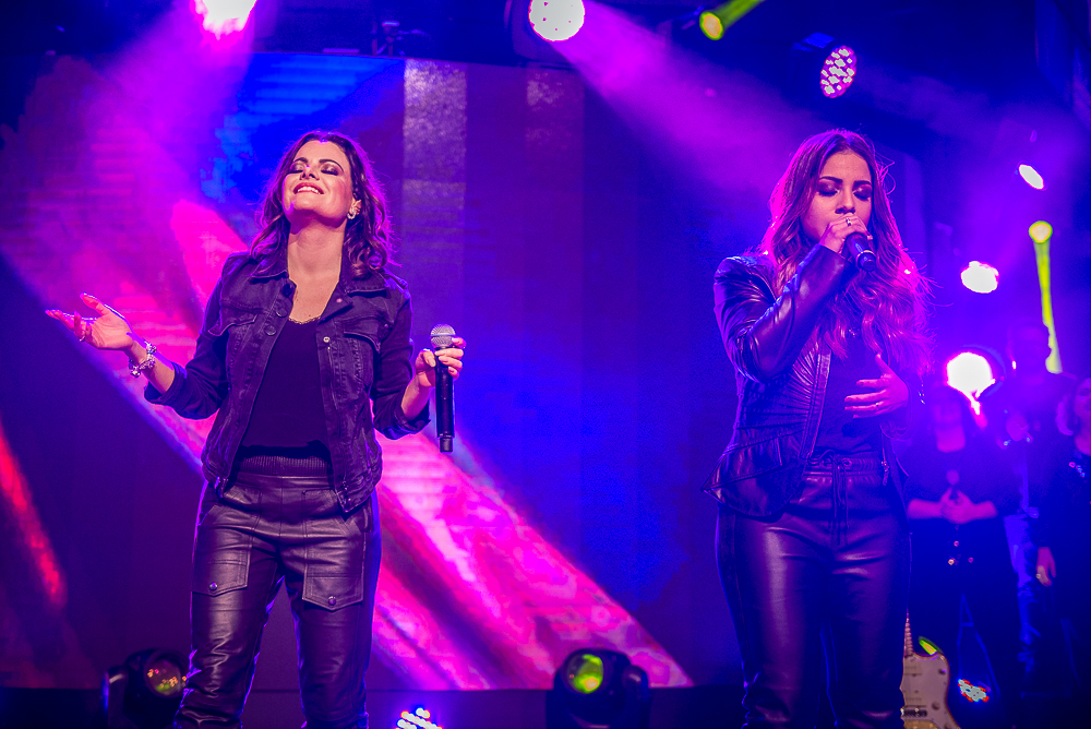 Ana Paula Valadão e Gabriela Rocha DT19 Álbum Outra Vez, Santo Espírito